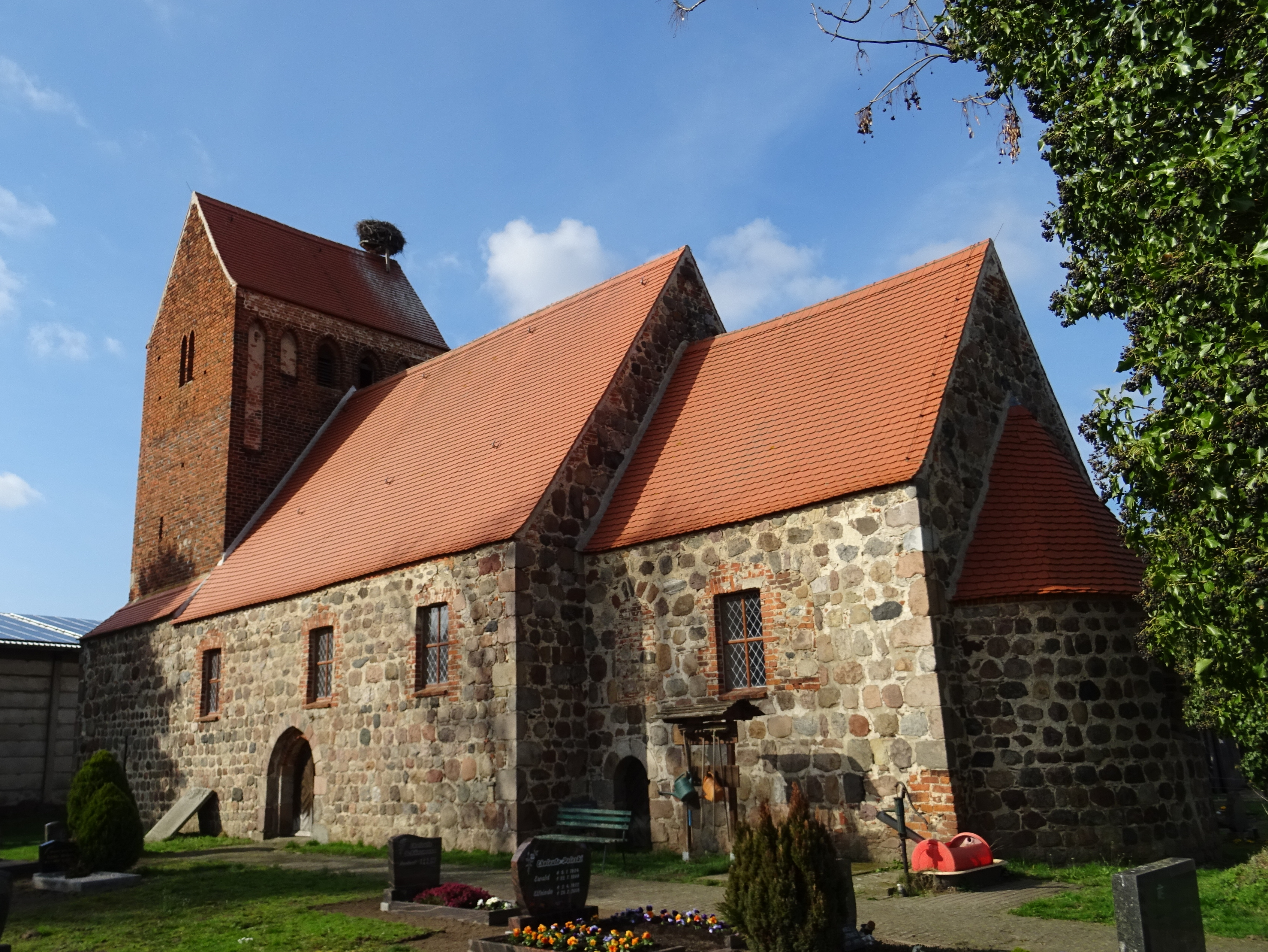 Dobbrun, Ortsteil von Osterburg, denkmalgeschützte Kirche